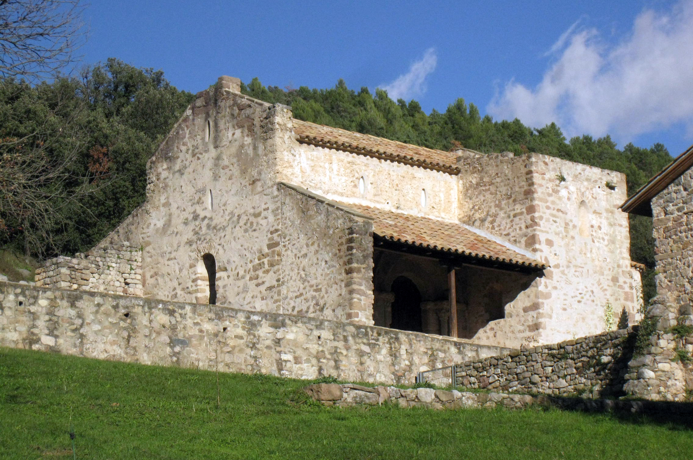 Església de Sant Quirze de Pedret (Cercs) Object location42° 06′ 26.93″ N, 1° 53′ 01.16″ E